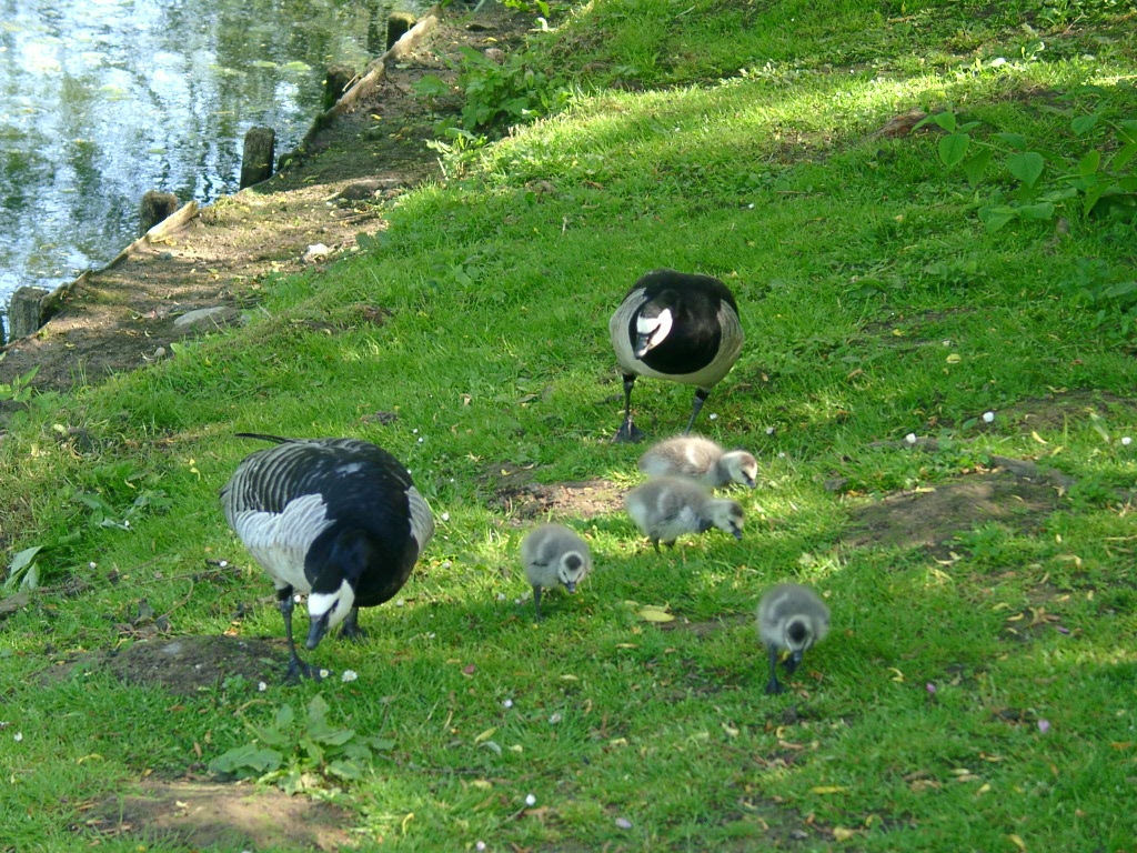 Nonnengans (Branta leucopsis) mit jungen Küken (2 Wochen alt)